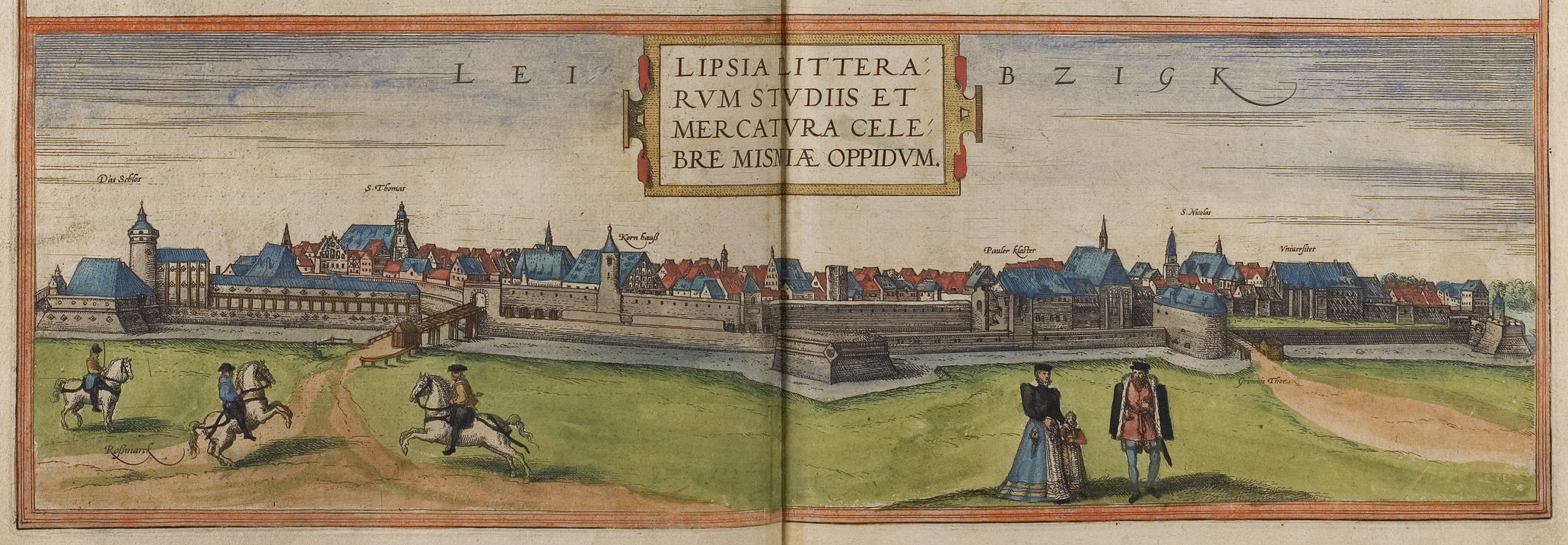 Leipzig